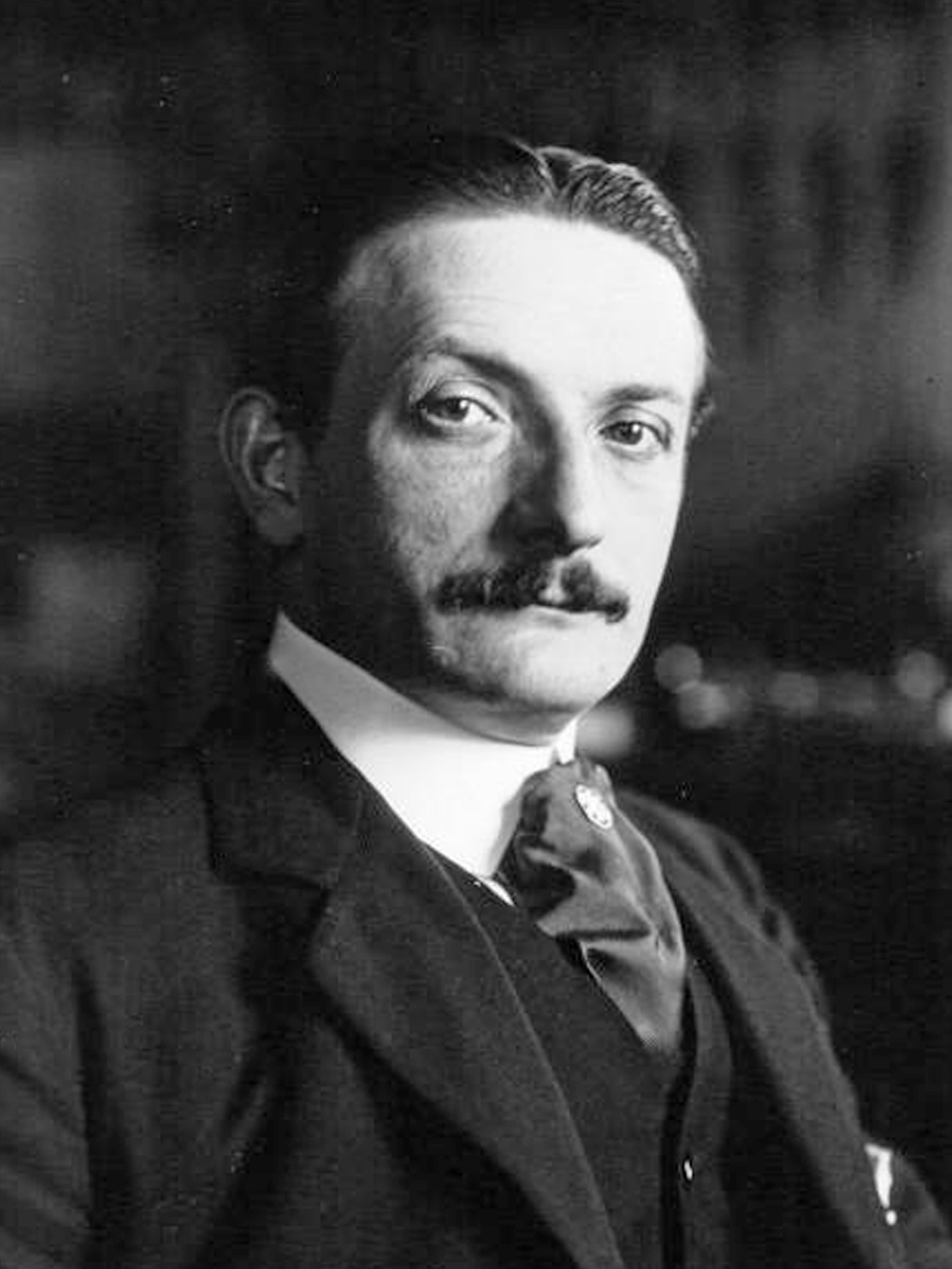 M. Daniélou, député du Finistère, député [photographie de presse]